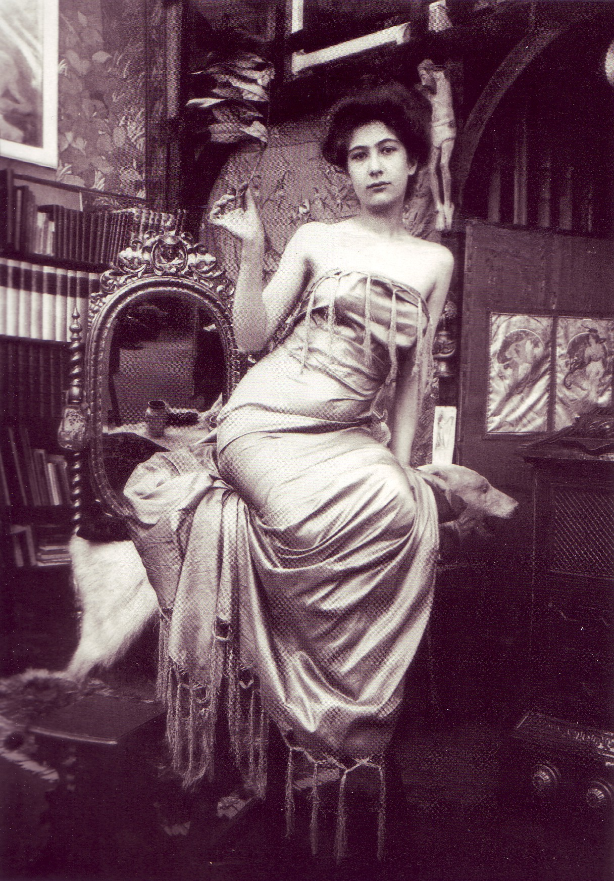 Fotografie Alfonse Muchy Alfons Mucha model model posing in muchas studio Paris